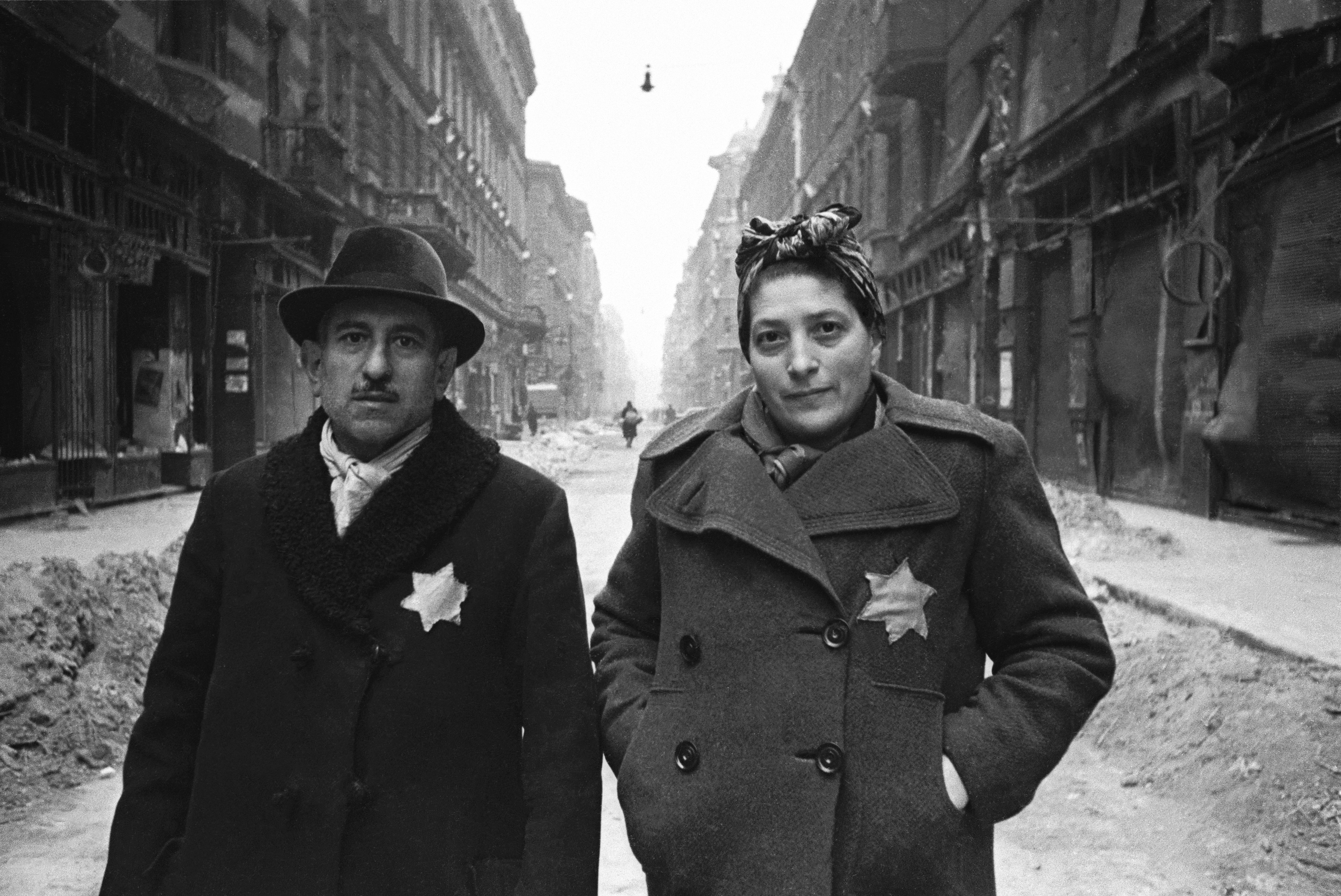 Ráday utca a Kálvin tér felől nézve. Location: Hungary, Budapest IX. Tags: yellow star, Budapest Title: Ráday utca a Kálvin tér felől nézve.